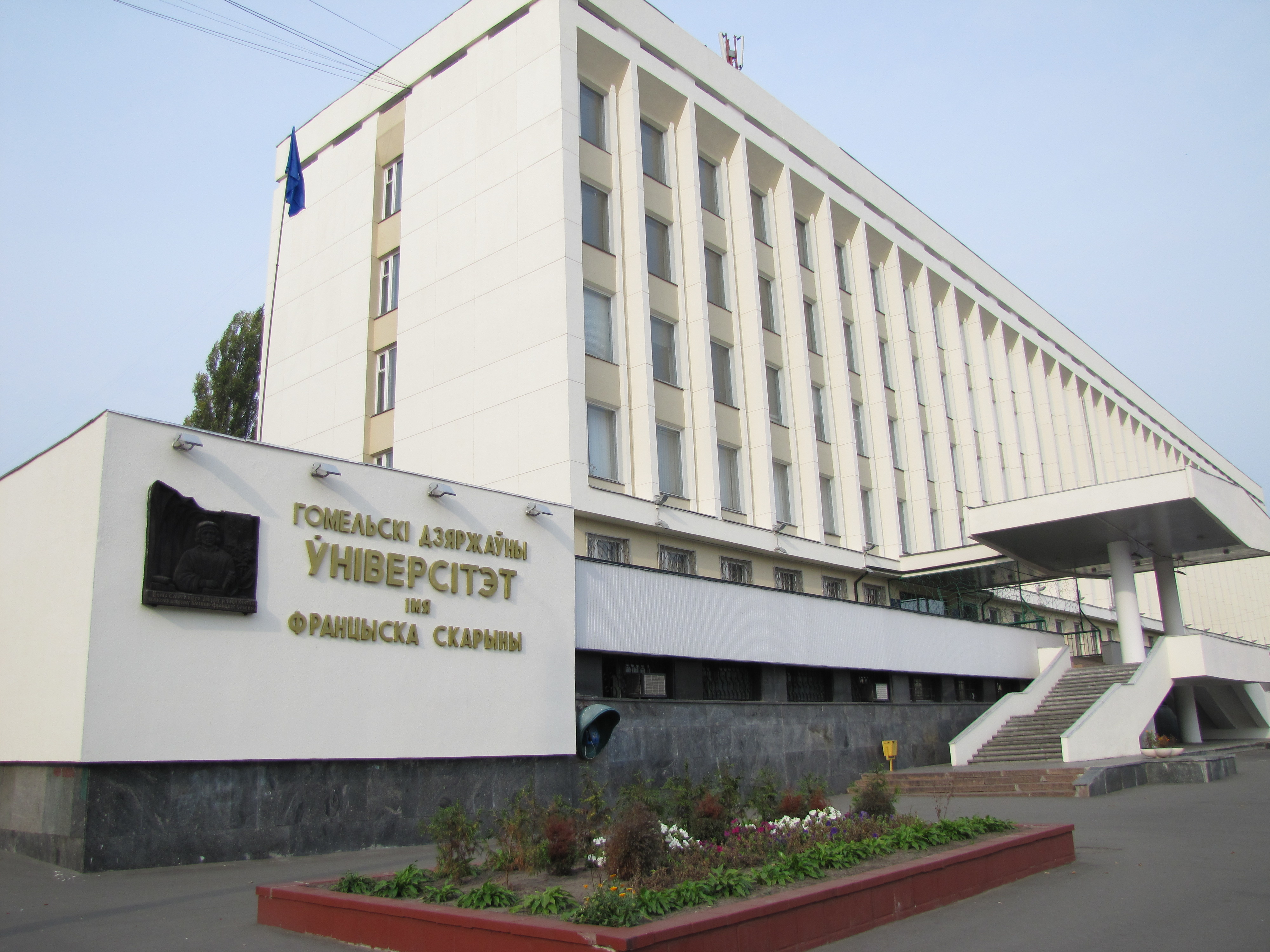 Главный корпус